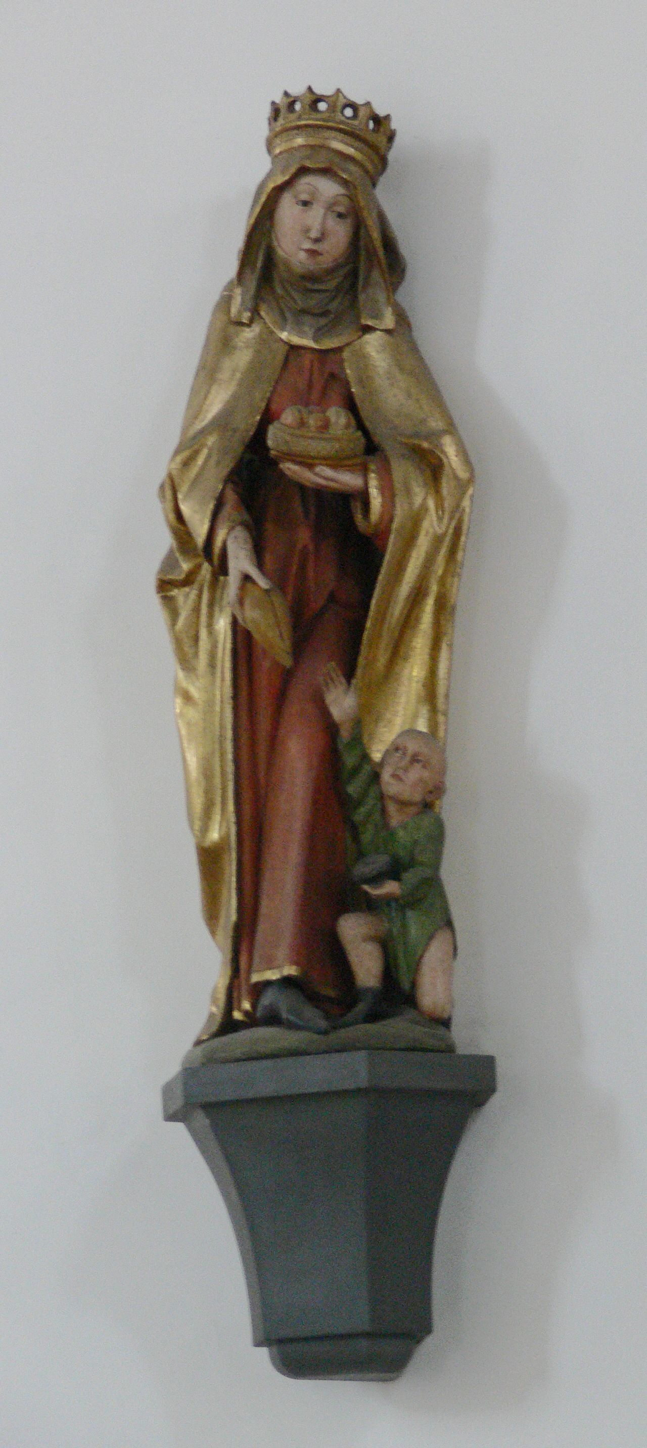 Pfarrkirche St. Martin, Aulendorf, Landkreis Ravensburg Figur „Hl. Elisabeth von Thüringen“, spätgotisch, um 1480